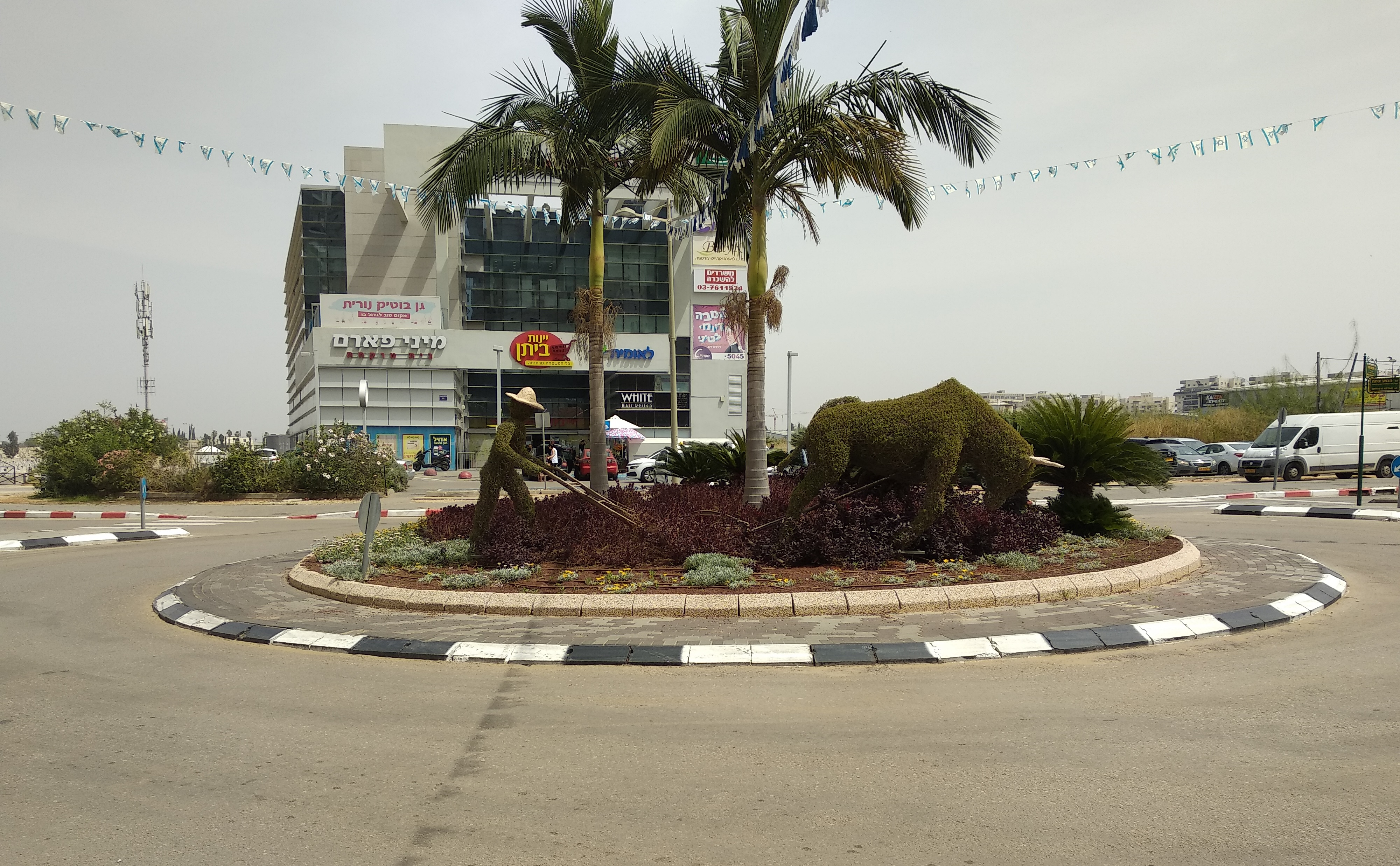 כיכר בשכונת אם המושבות, פתח תקווה